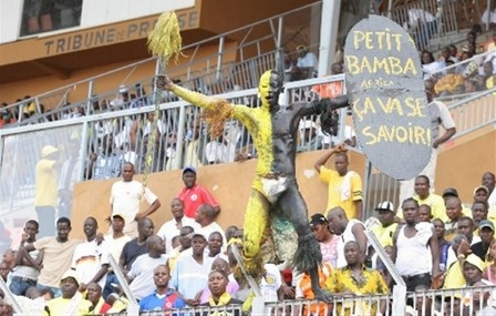 un supporter pendant le derby ASEC - AFRICA au stade Felicia à Abidjan